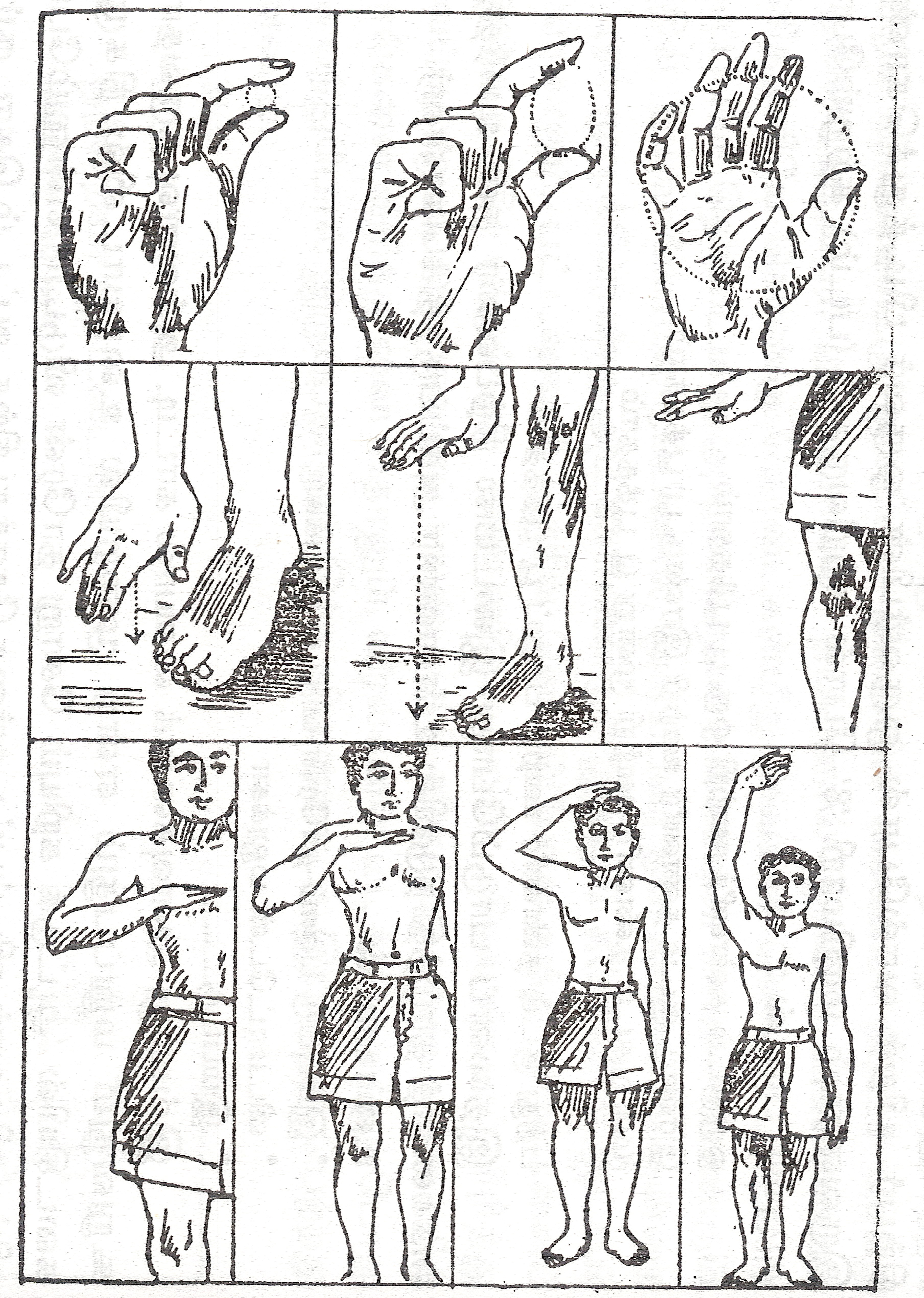 தமிழ்